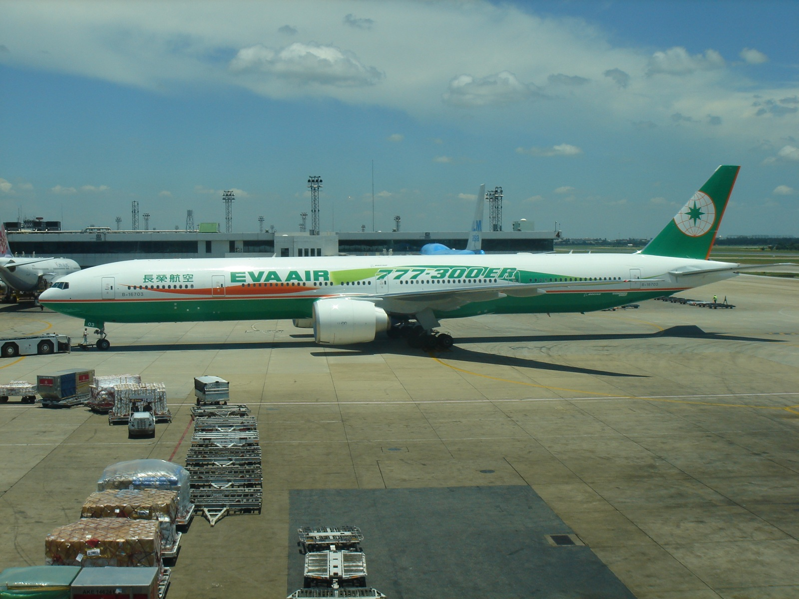 EVA Air Boeing 777-300ER.